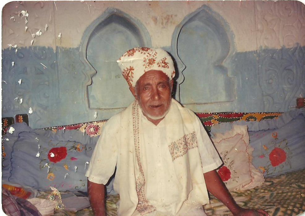 فؤاد المحنبي25